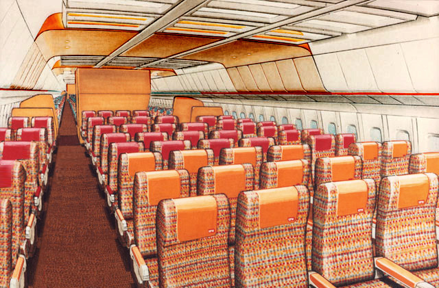 LTU: Interior-Design für die Lockheed L-1011 als Ferienflieger